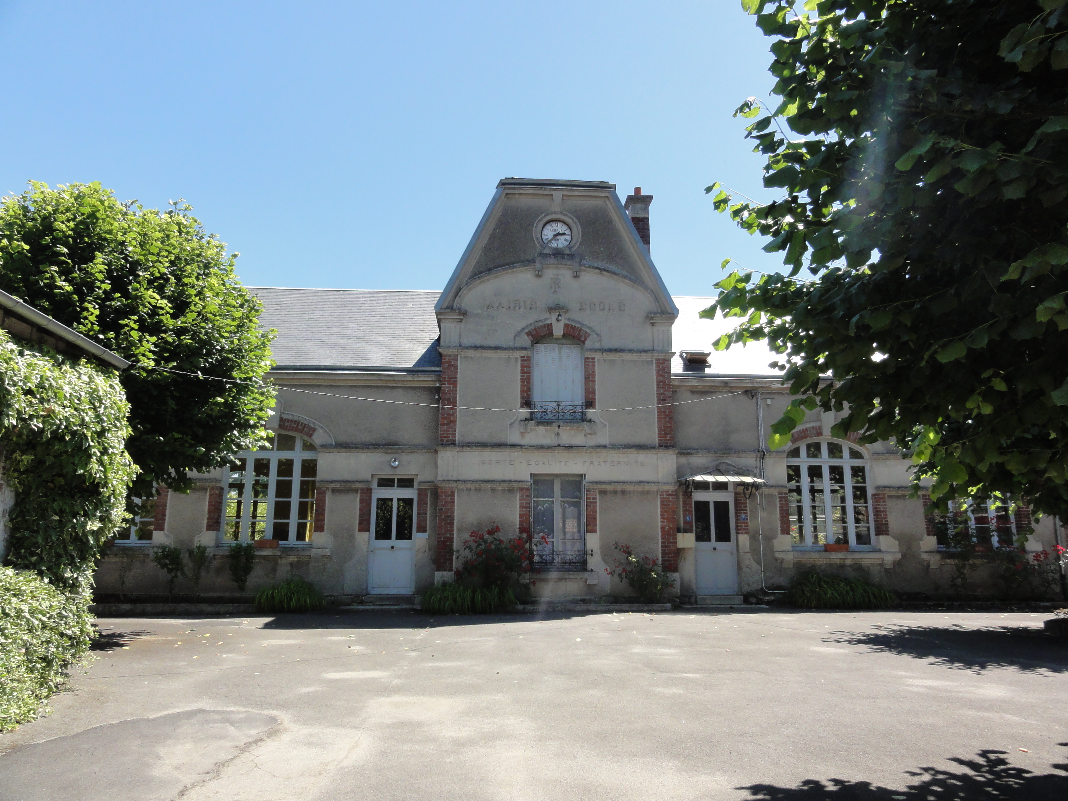 Viel-Arcy (Aisne) mairie-école